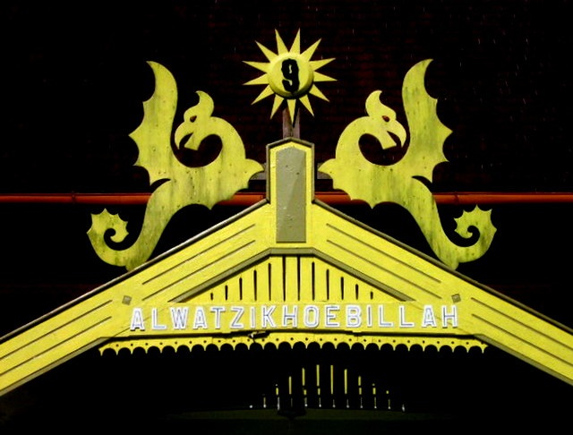 Lambang Kesultanan Sambas